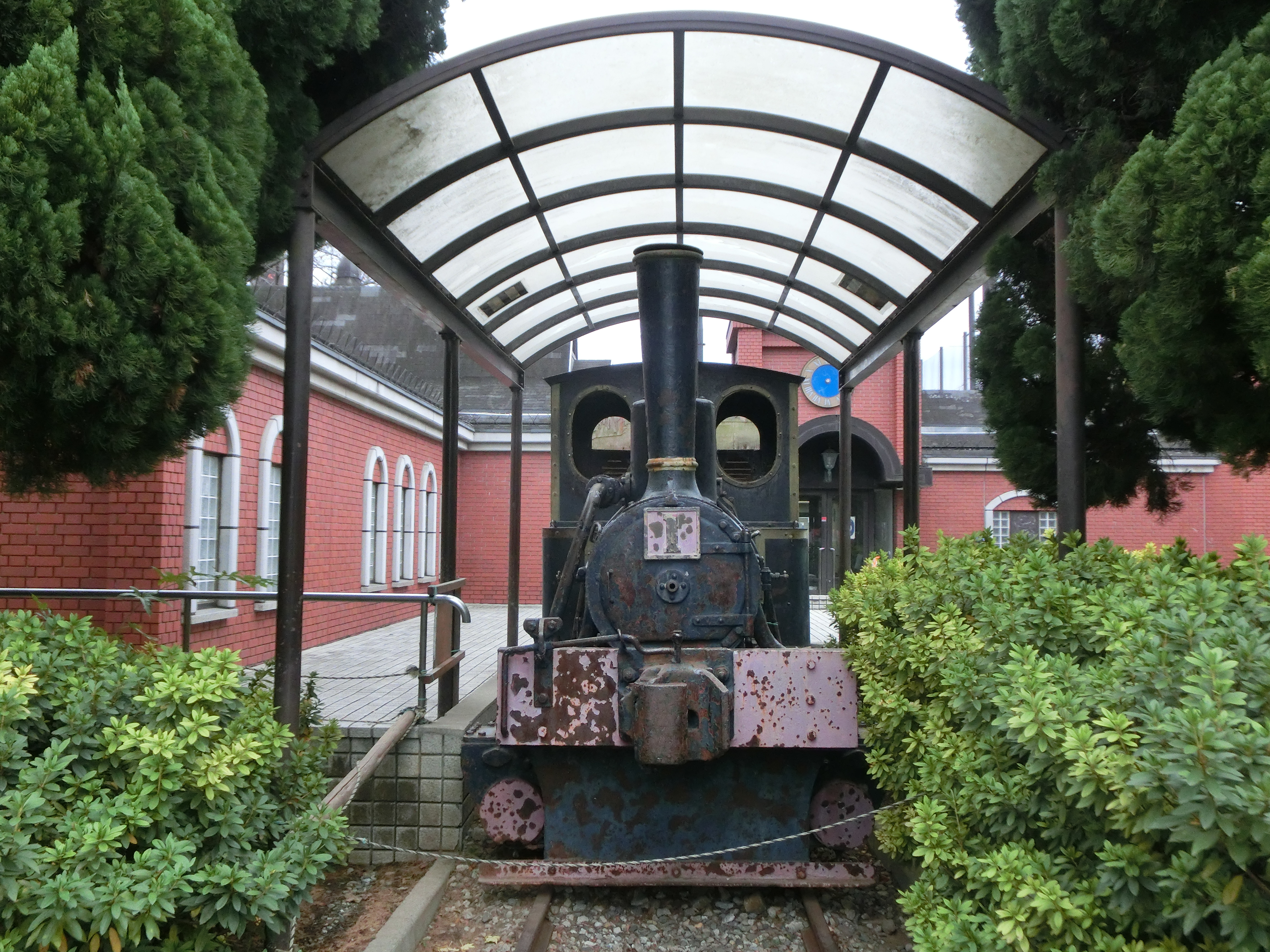 東京都板橋区の城北公園に保存されている有田鉄道（東武鉄道）1号蒸気機関車